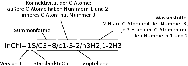 InChI-Notation von Propan mit Anmerkungen zum Aufbau